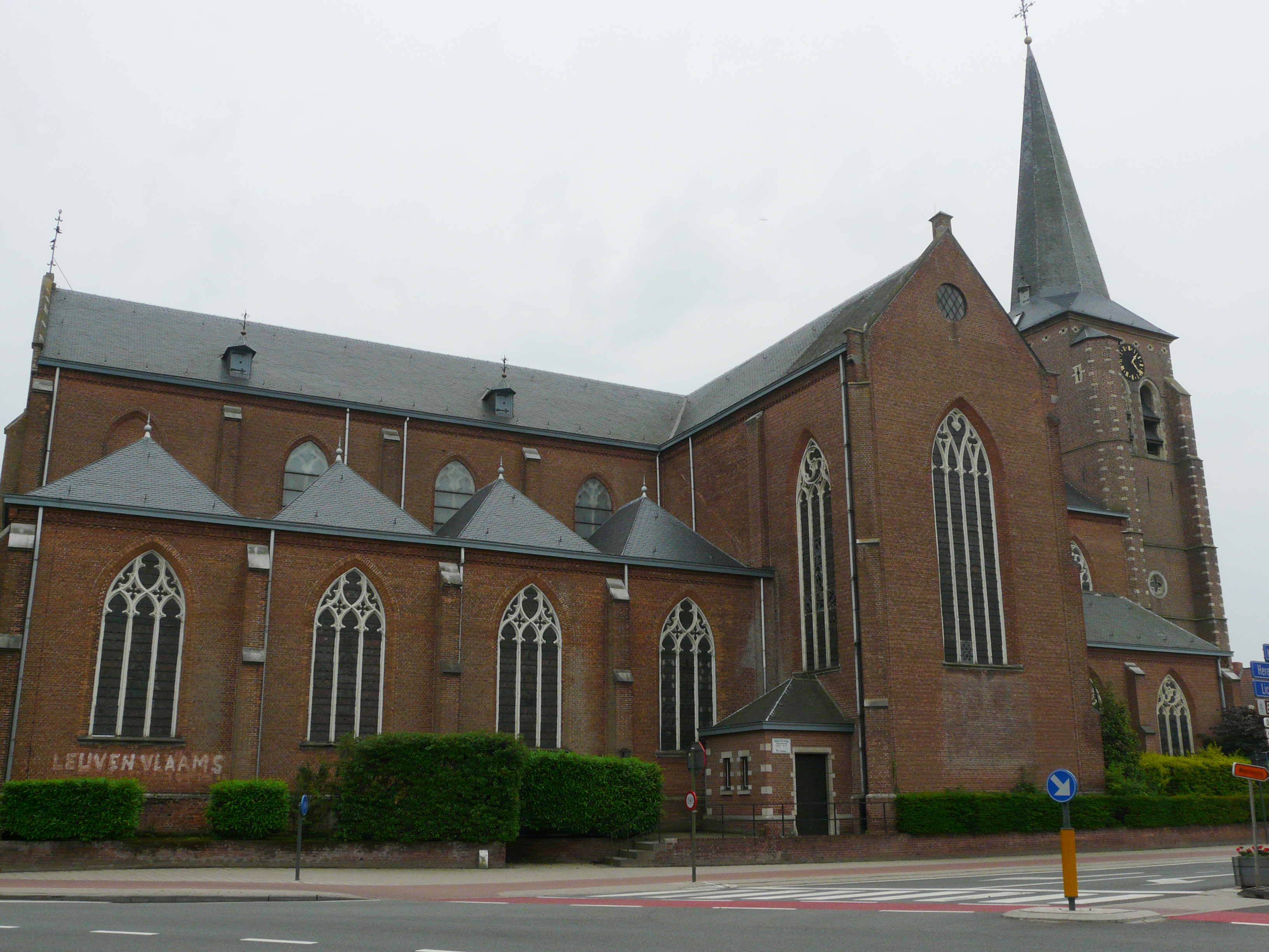 St. Willebrorduskerk in Kasterlee